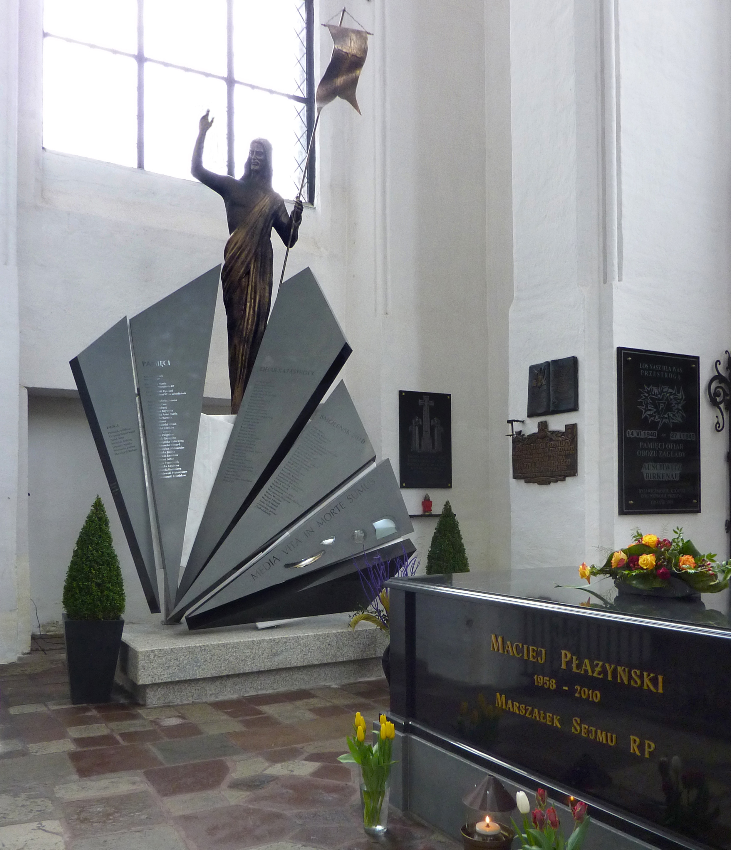 Pomnik ofiar katastrofy samolotu rządowego pod Smoleńskiem w Bazylice Mariackiej w Gdańsku